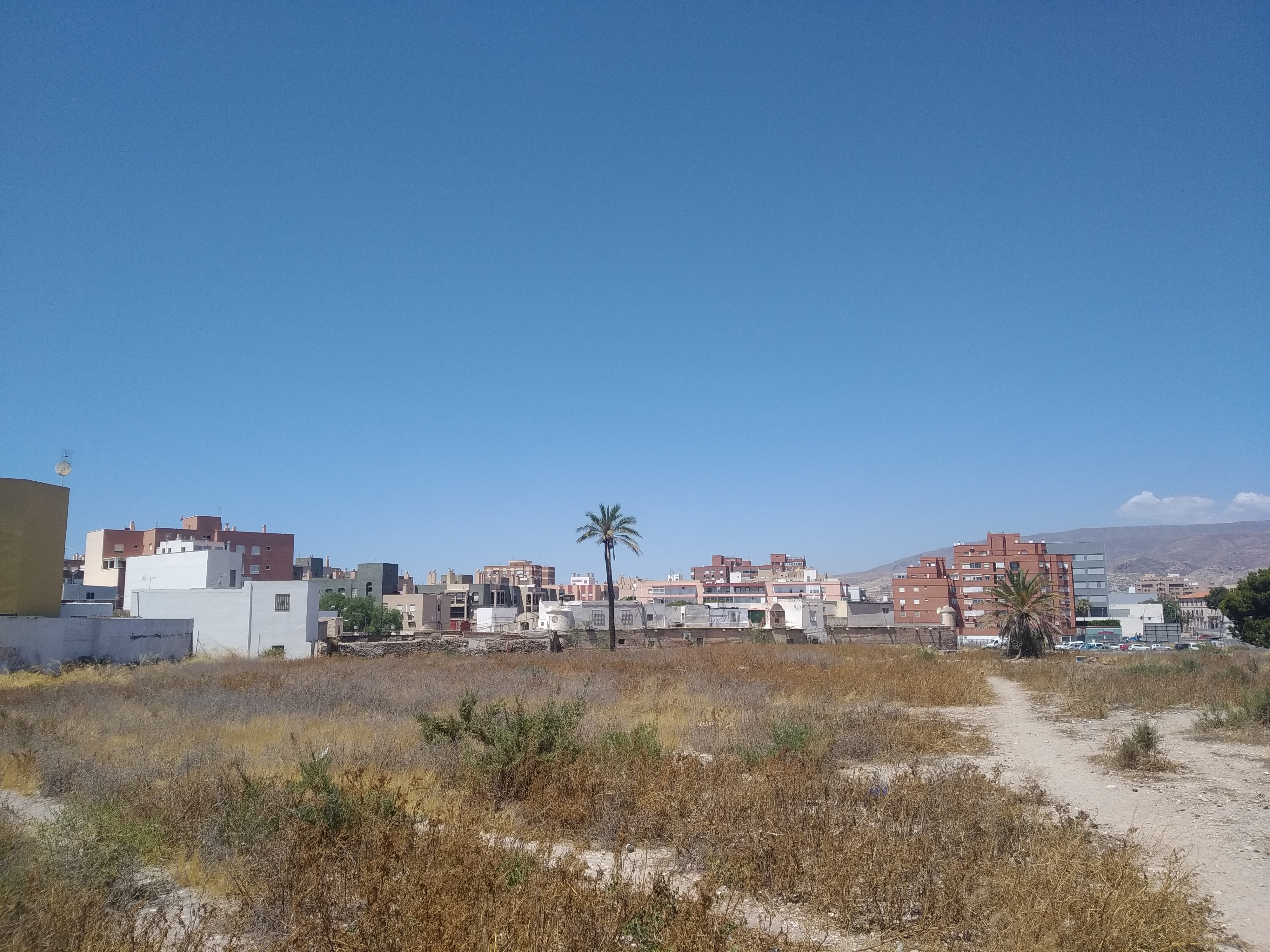 Vista del Castillo del Diezmo desde la calle Pilares. Se aprecia la muralla, dos torreones y garitas y las viviendas ilegales adosadas al monumento.